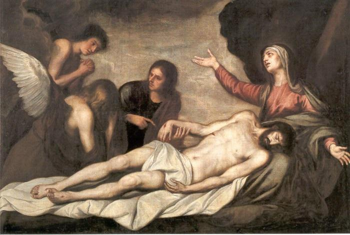 La obra representa a los familiares y discípulos de Jesucristo lamentándose de su muerte junto a su cadáver.